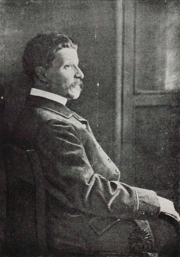 Михаил Александрович Врубель (1856 — 1910) — русский художник.